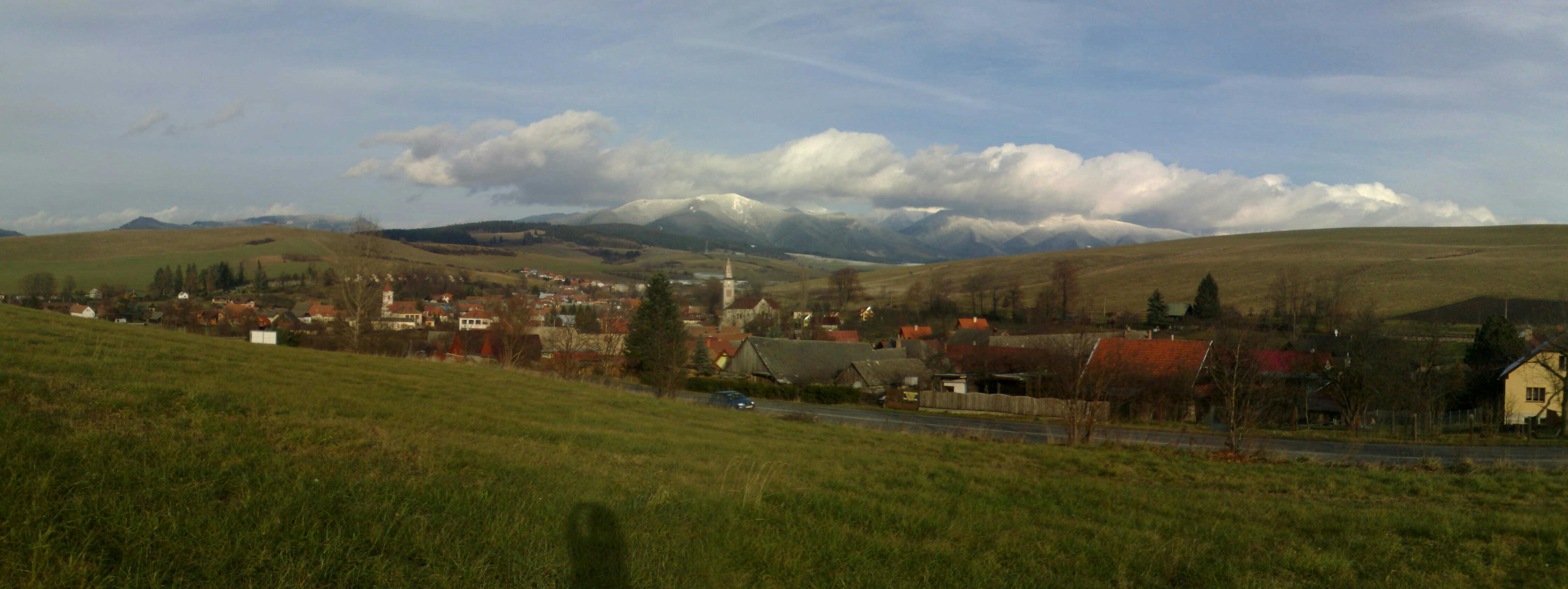 Liptovsky Trnovec z Hajikov 2